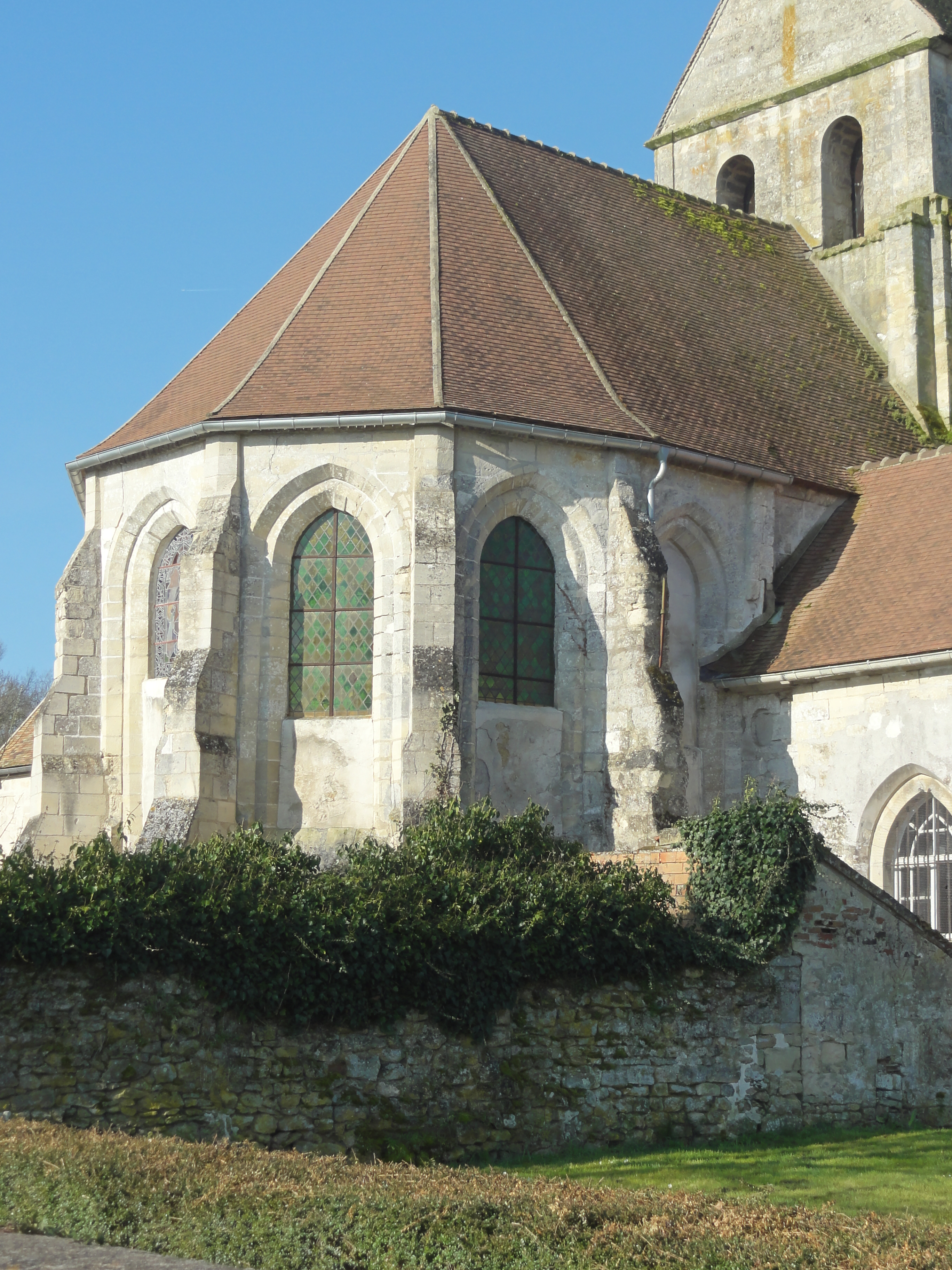 Église Notre-Dame-de-l'Assomption de Gouzangrez - voir titre.